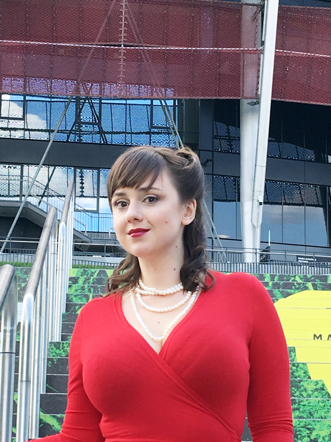 Maria Paszyńska na Warszawskich Targach Książki - Stadion Narodowy 19 maja 2018